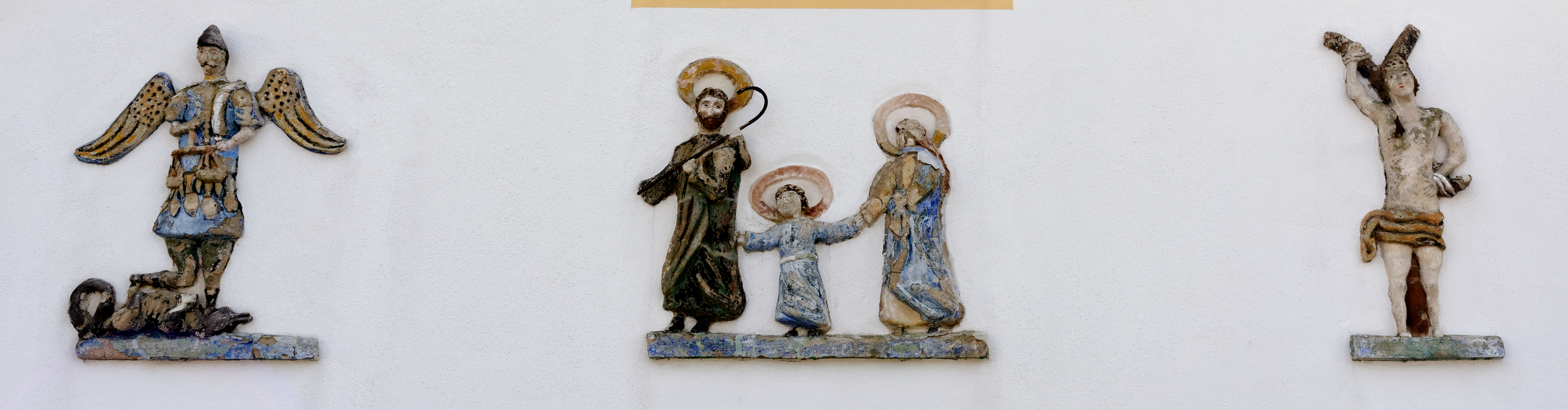 Heilige Michael und Sebastian, Heilige Familie, von Bartholomäus Ostermair, Ende 19. Jahrhundert; ursprünglich in Zieglbach, 2016 nach Taiting transferiert